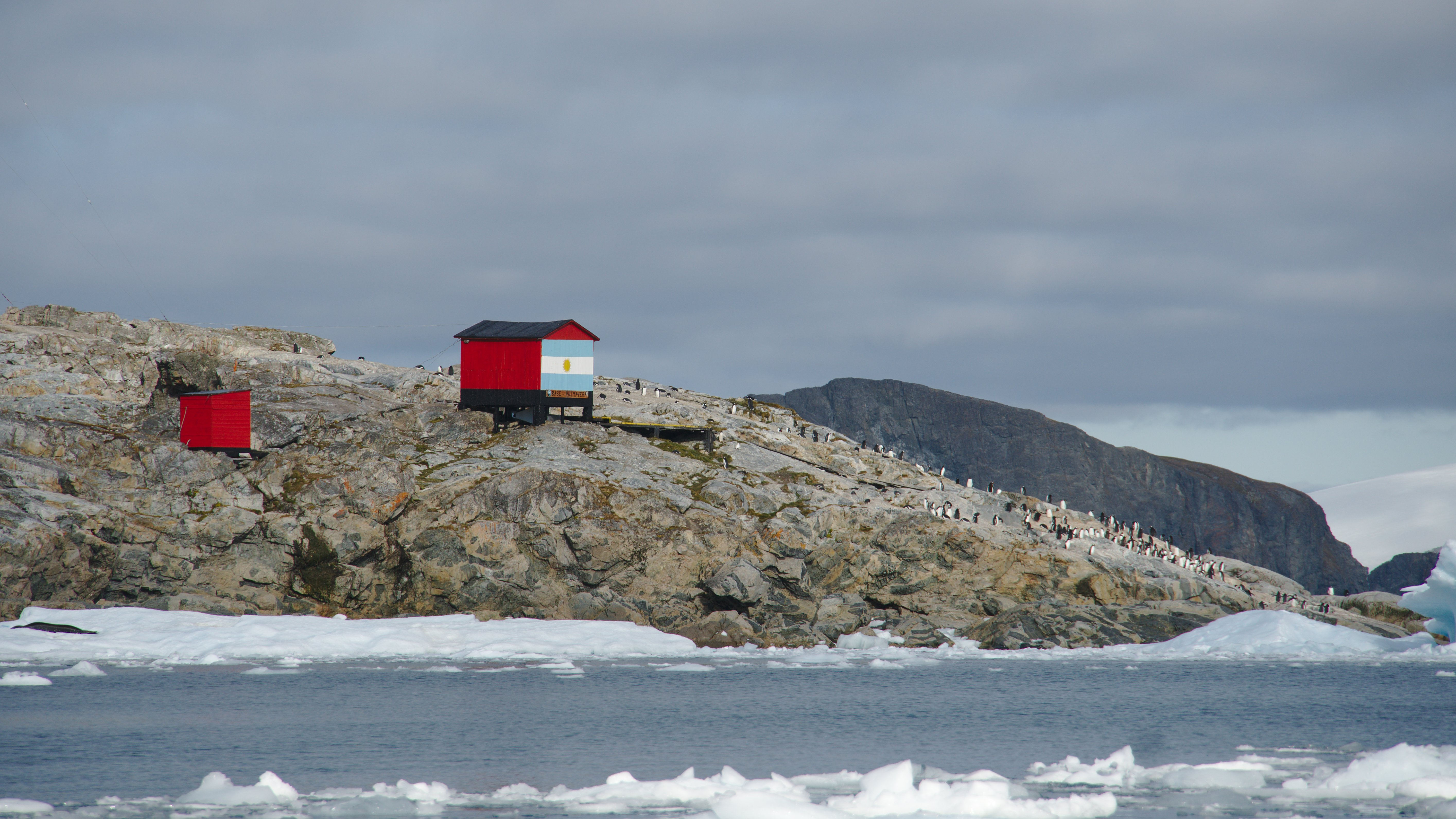 Primavera Base, Cierva Cove